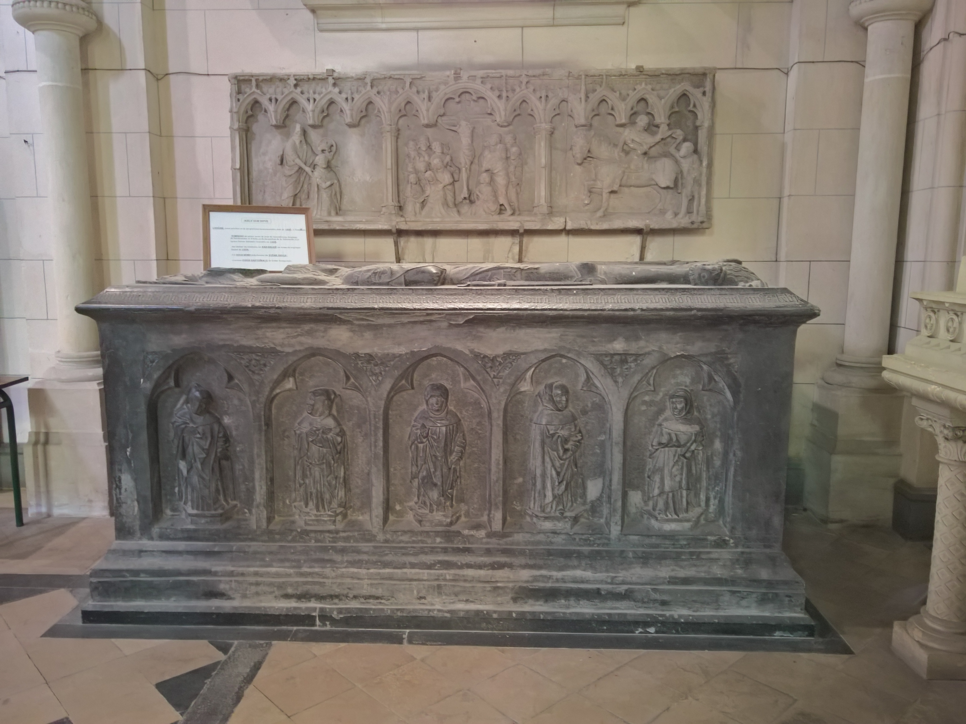 Sépulture de Jean de Luxembourg et de son épouse, Jacqueline de la Tremoille, dans l'église Saint-Martin d'Ailly-sur-Noye